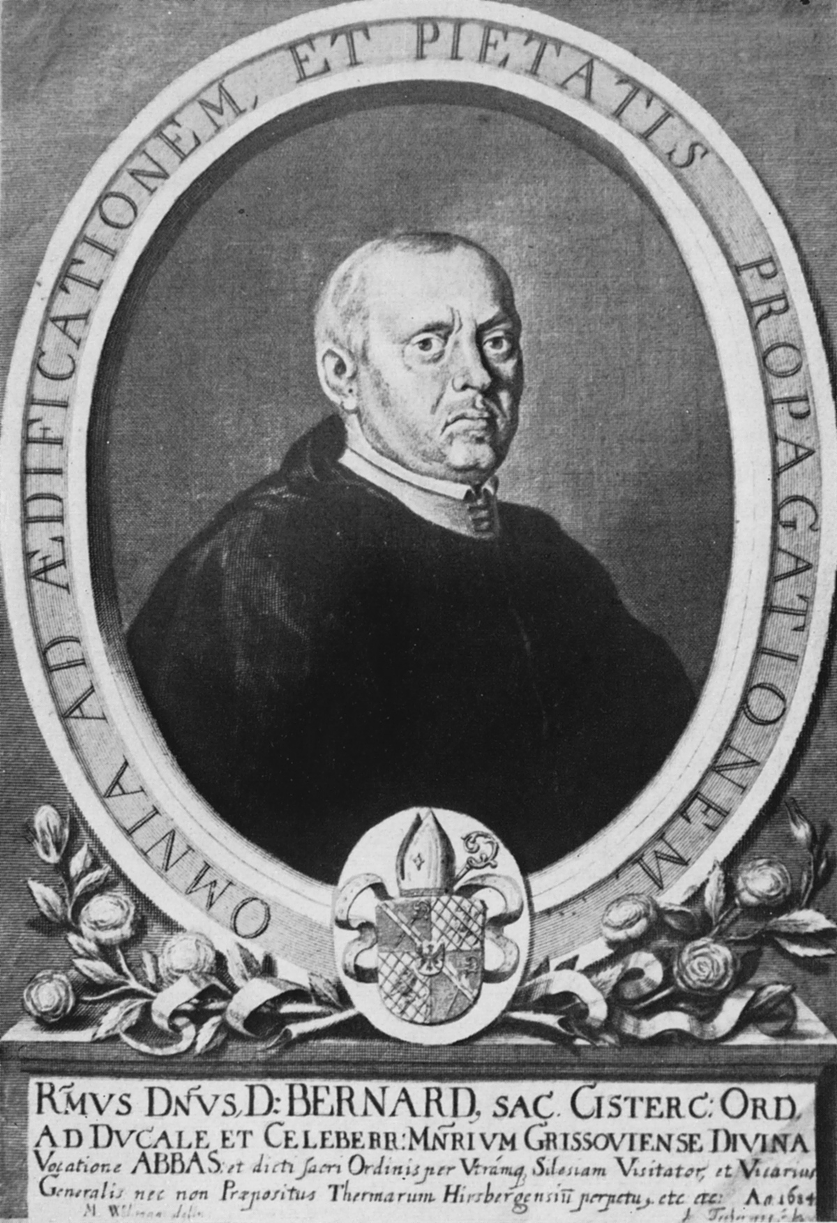 Bernardus Rosa, Abt von Grüssau 1660-96